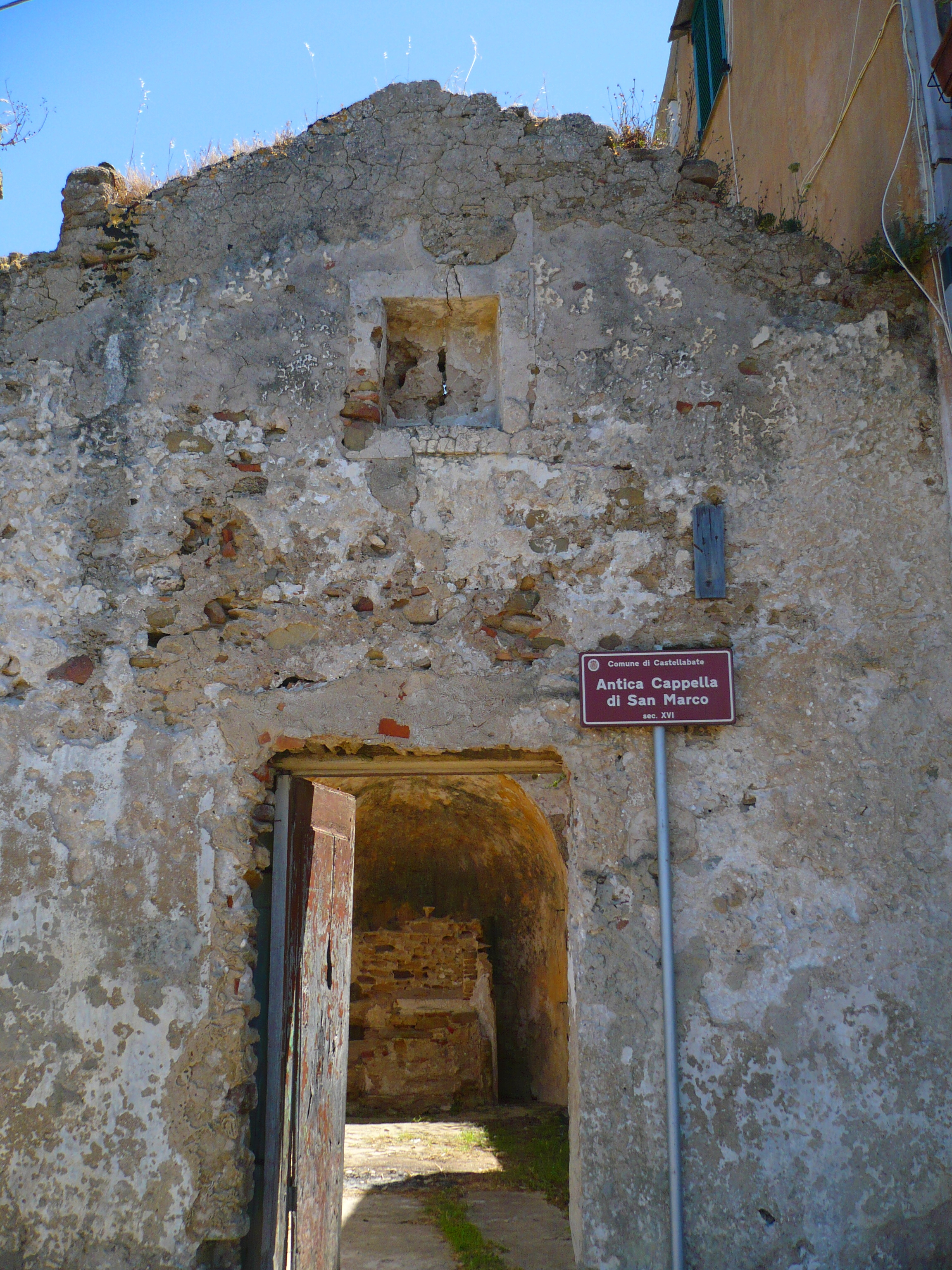 Il rudere dell'antica cappella di san marco ev. a san marco di castellabate